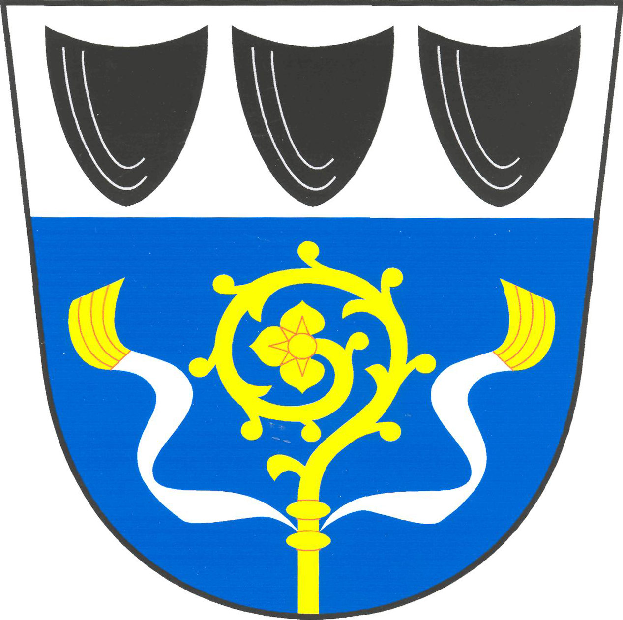 Znak obce Kamenice (okres Jihlava)